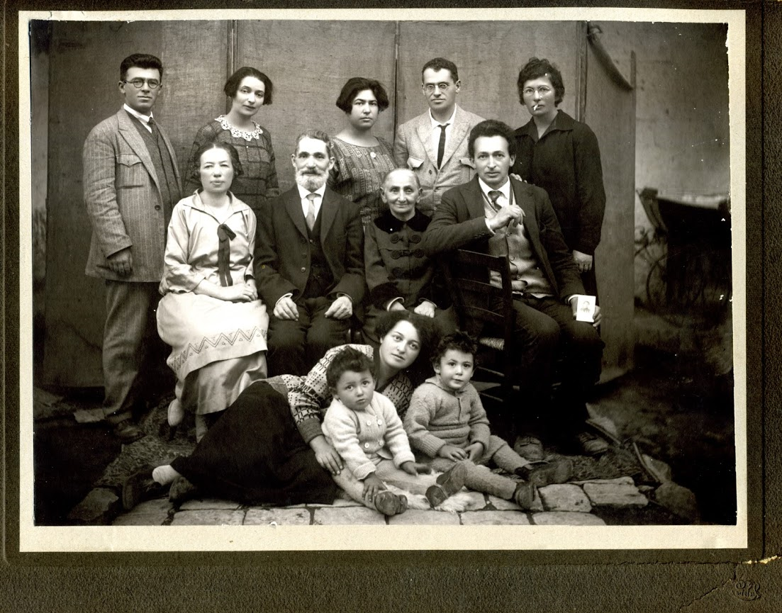 יושבים: יצחק בן צבי, הסבתא אסתר, אב המשפחה צבי שמשי, אשתו דבורה. עומדים: רחל ינאית בן צבי, אהרון ראובני, אשתו סופי ראובני, שולמית ובעלה פרופסור יצחק קלוגאי. למטה: דינה מזר עם הבנים של בן צבי עלי ועמרם. (1926)